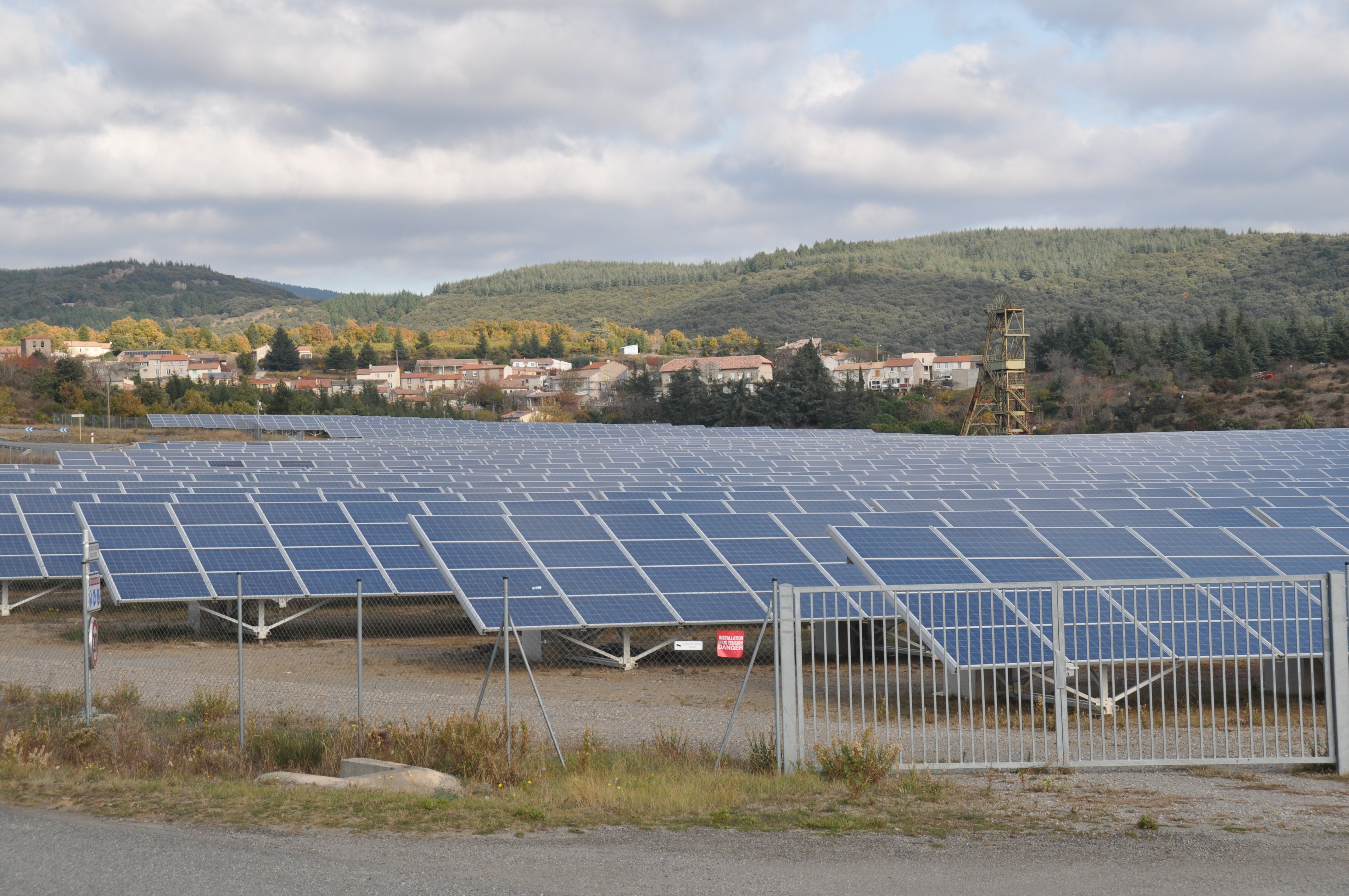 Le village de Villanière en arrière plan de la centrale photovoltaïque et du puits Castan